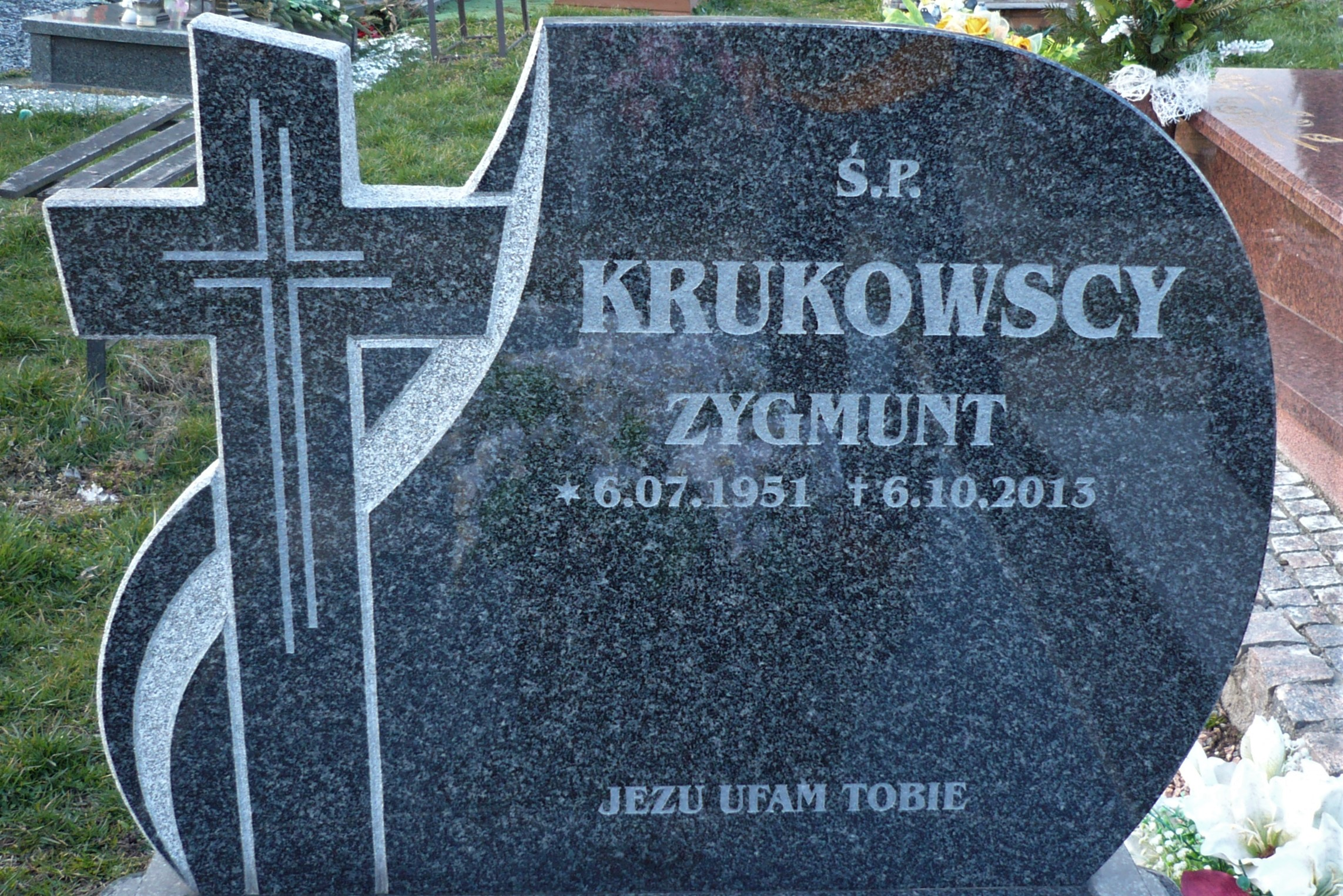 Cmentarz w Nowej Rudzie Krukowski